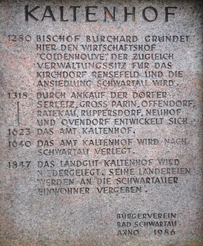 Gedenktafel - Amt Kaltenhof